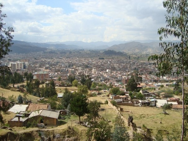 Ciudad de Sogamoso, Boyacá